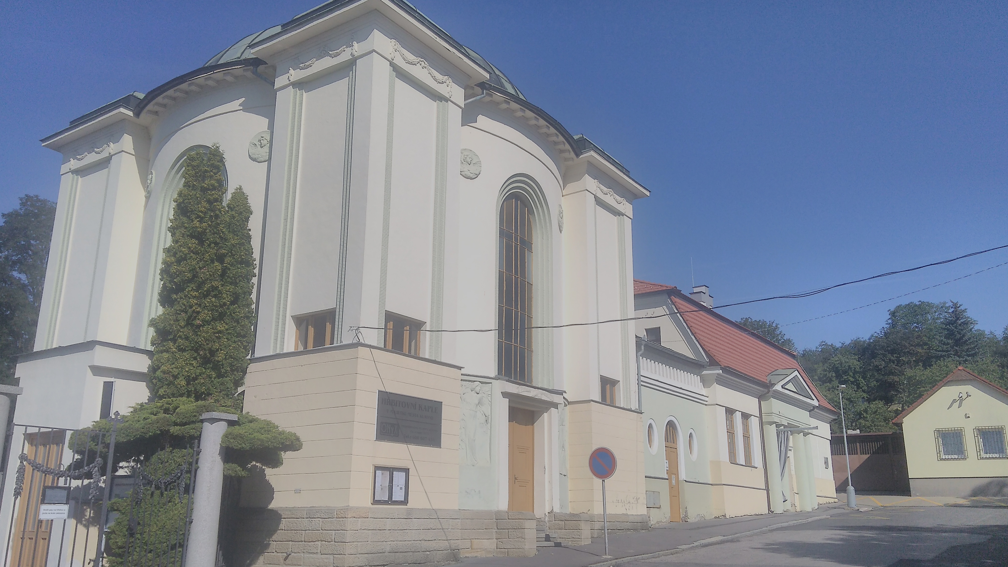 hřbitovní kaple